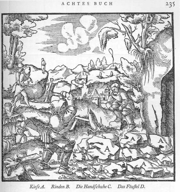 Bergbau am Rammelsberg Abbildung Seite 235 aus 8. Buch Georg Agricola, 1556